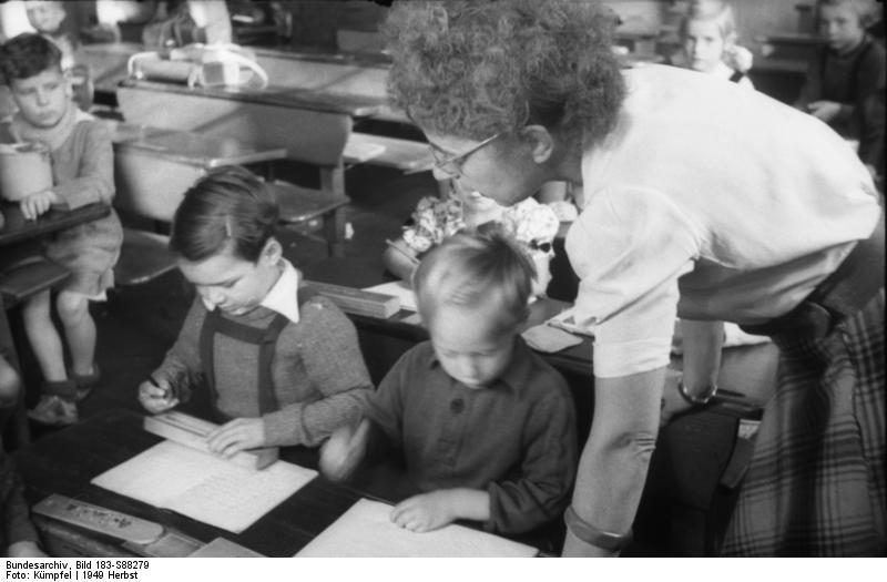 ADN-ZB Kümpfel Berlin 1949: "Tag der offenen Türen" Anläßlich der Volksbildungswoche fand in den Berliner Schulen ein Tag der offenen Schultür statt. Die Bevölkerung, vor allem die Eltern, hatten Gelegenheit dem Unterricht beizuwohnen. -In der 14. Volksschule in der Prenzlauer Allee. Die Schulanfängerklasse von Fräulein Häuer. UBz: Die Lehrerin beschäftigt sich mit jedem einzelnen Schüler. 4050-49